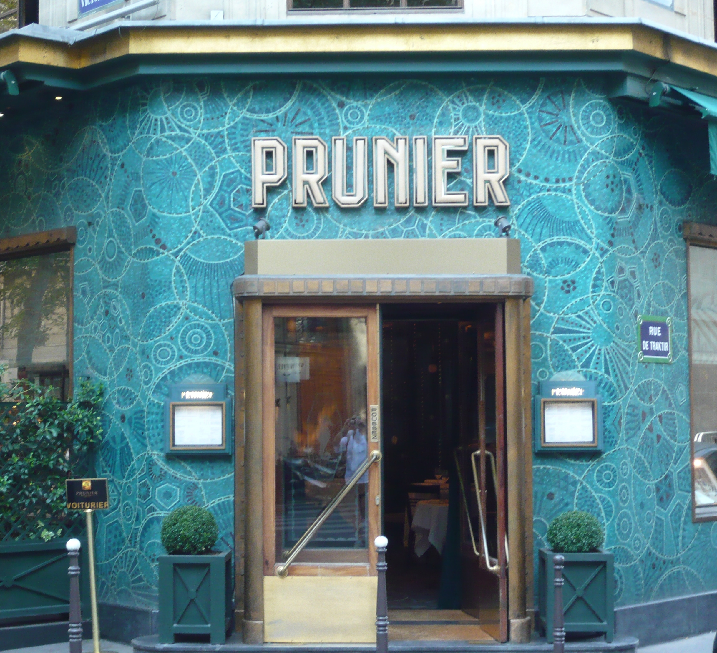 Restaurant Prunier . Object location48° 52′ 21.11″ N, 2° 17′ 29.99″ E